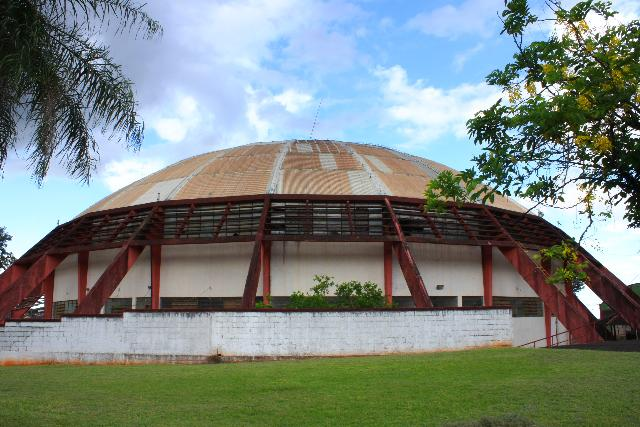 Ginásio Brasileiro